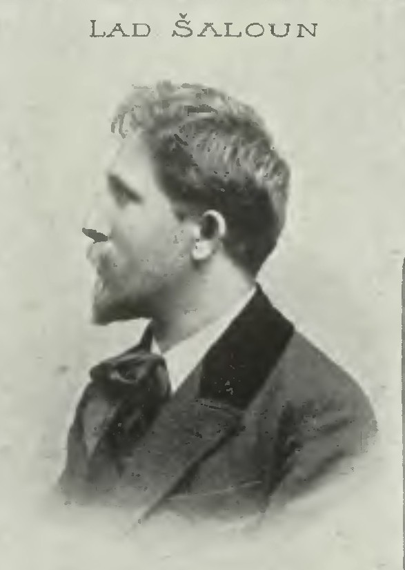 Portrét – Ladislav Jan Šaloun (1870-1946), Český sochař.